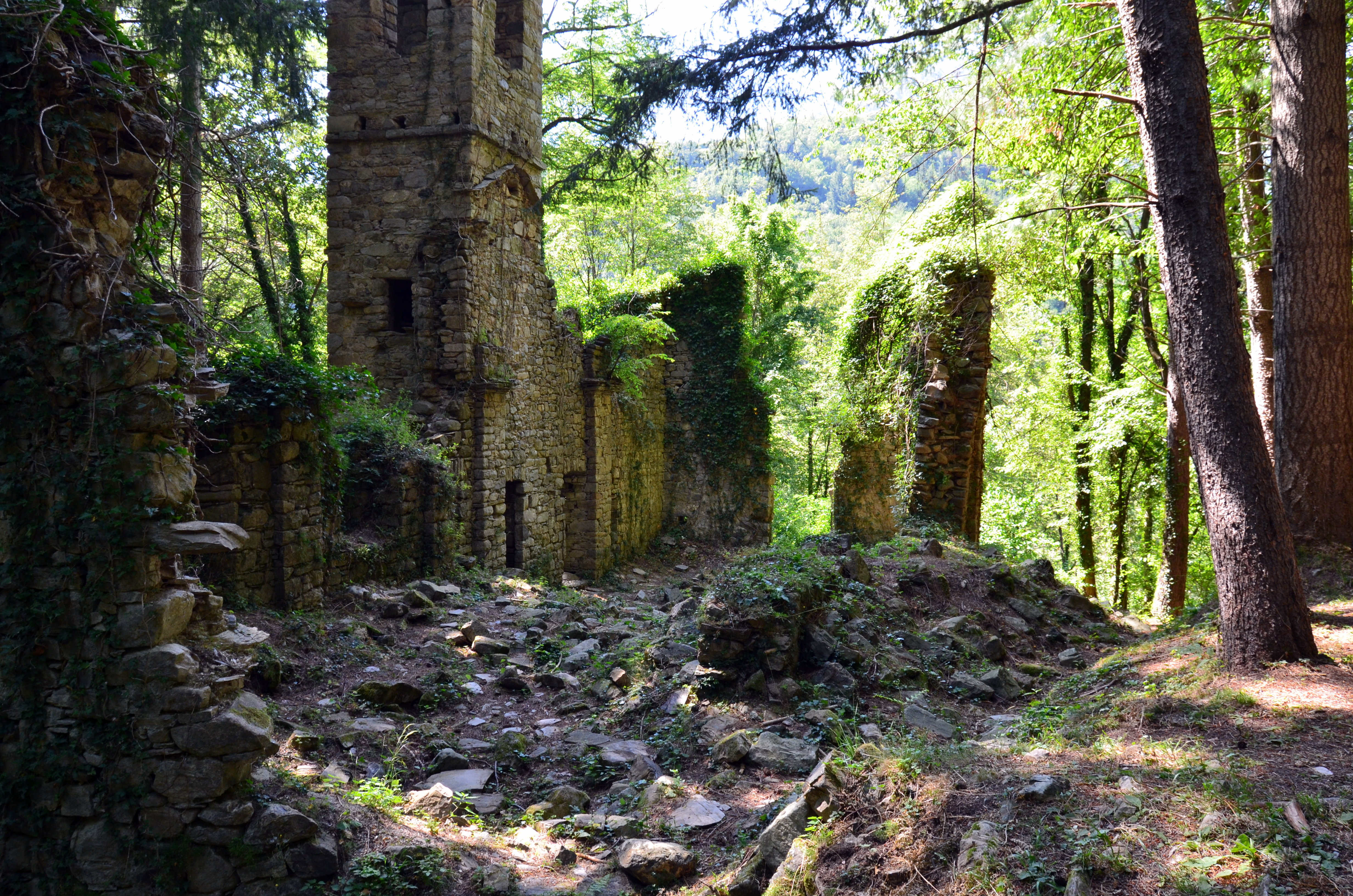 I ruderi della chiesa di San Martino di Licciorno, Prato Sopralacroce, Borzonasca, Liguria, Italia